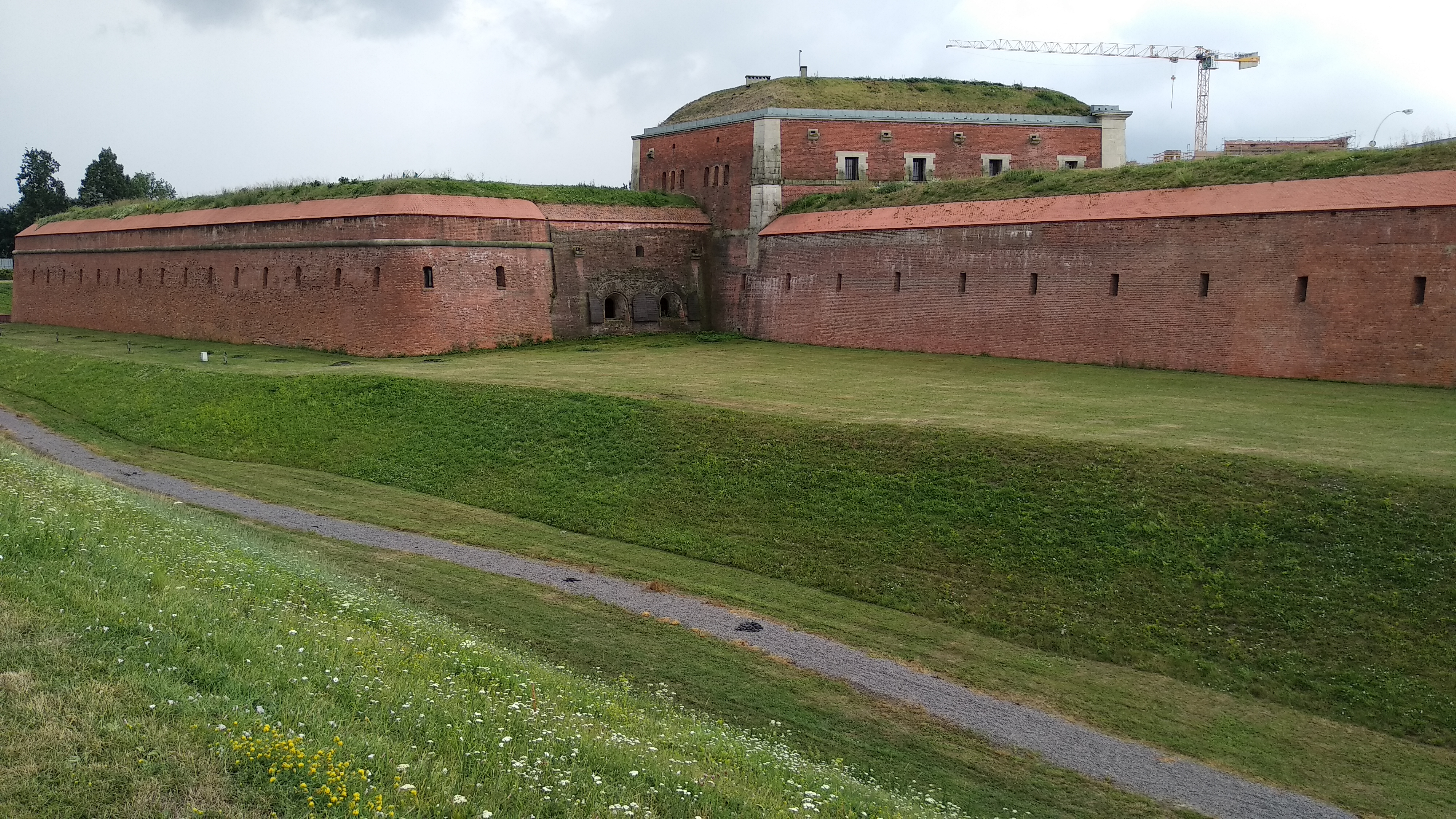 Bastion VII Twierdzy Zamość.